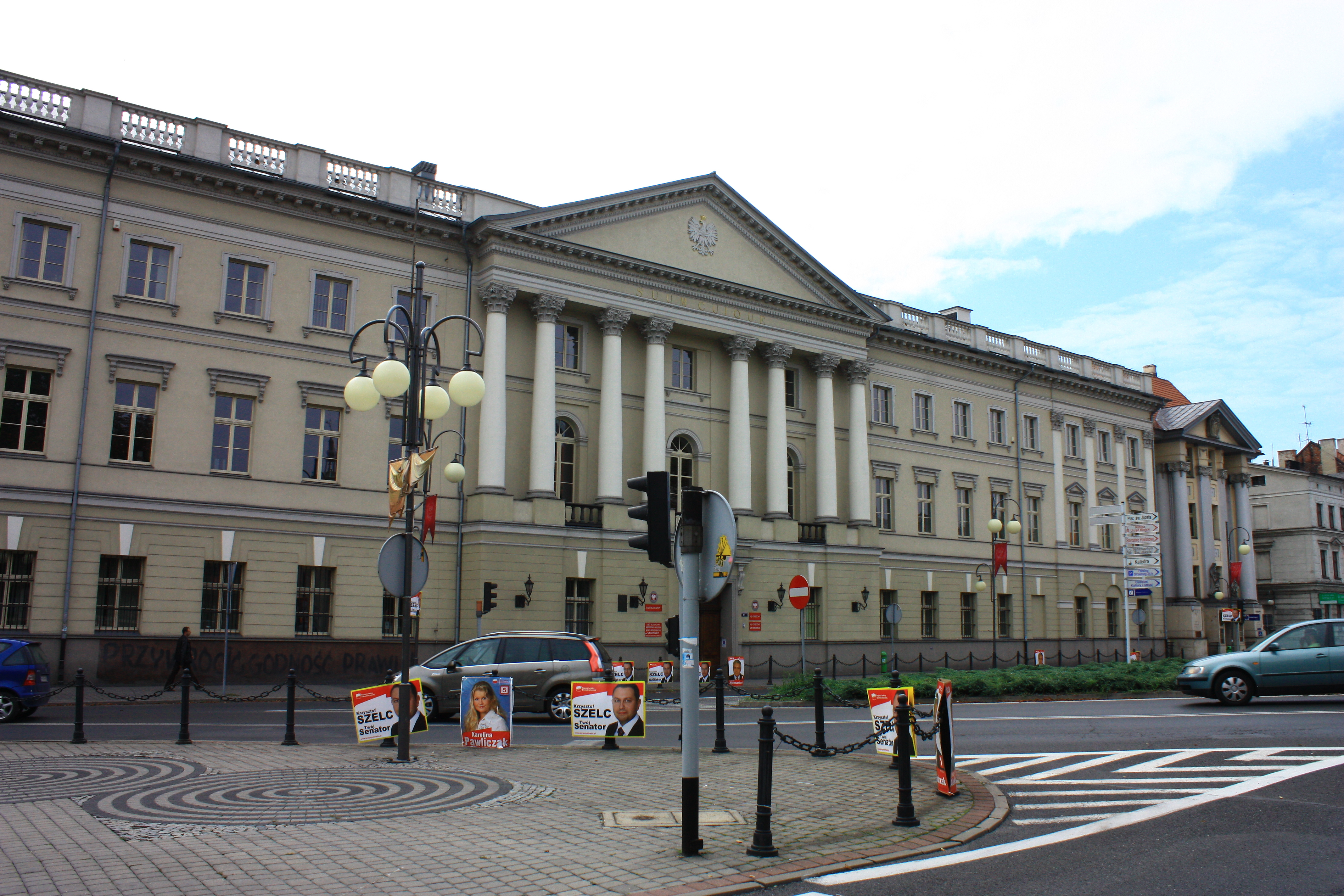 Kalisz, trybunał, ob. sąd, 1820-1824